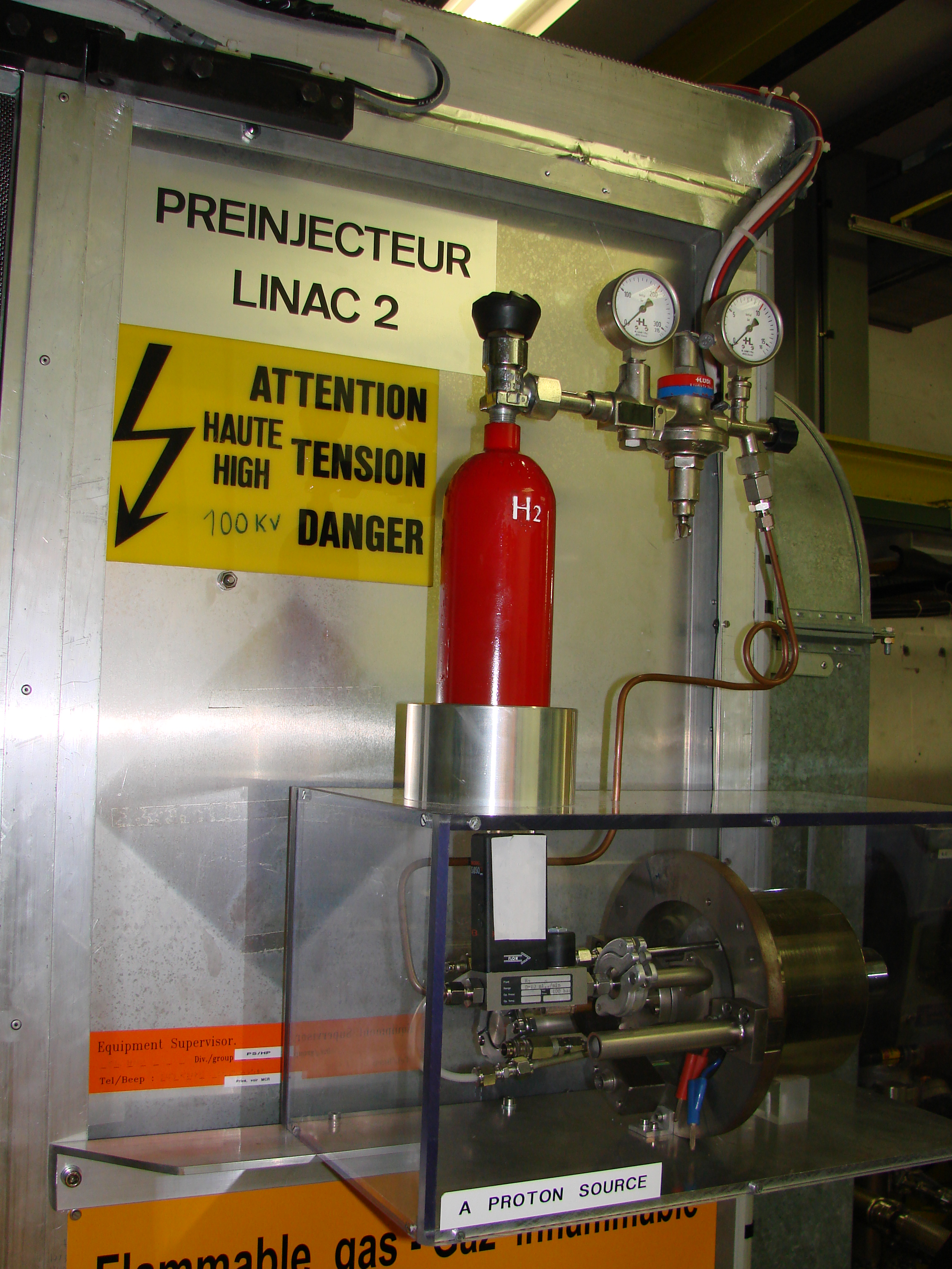 Protonenquelle des LINAC2-Beschleunigers (vor PS, am CERN)